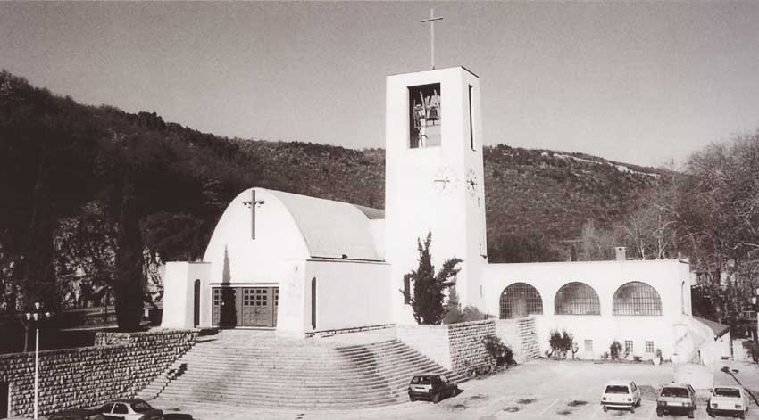 Crkva Sv. Barbare u Raši